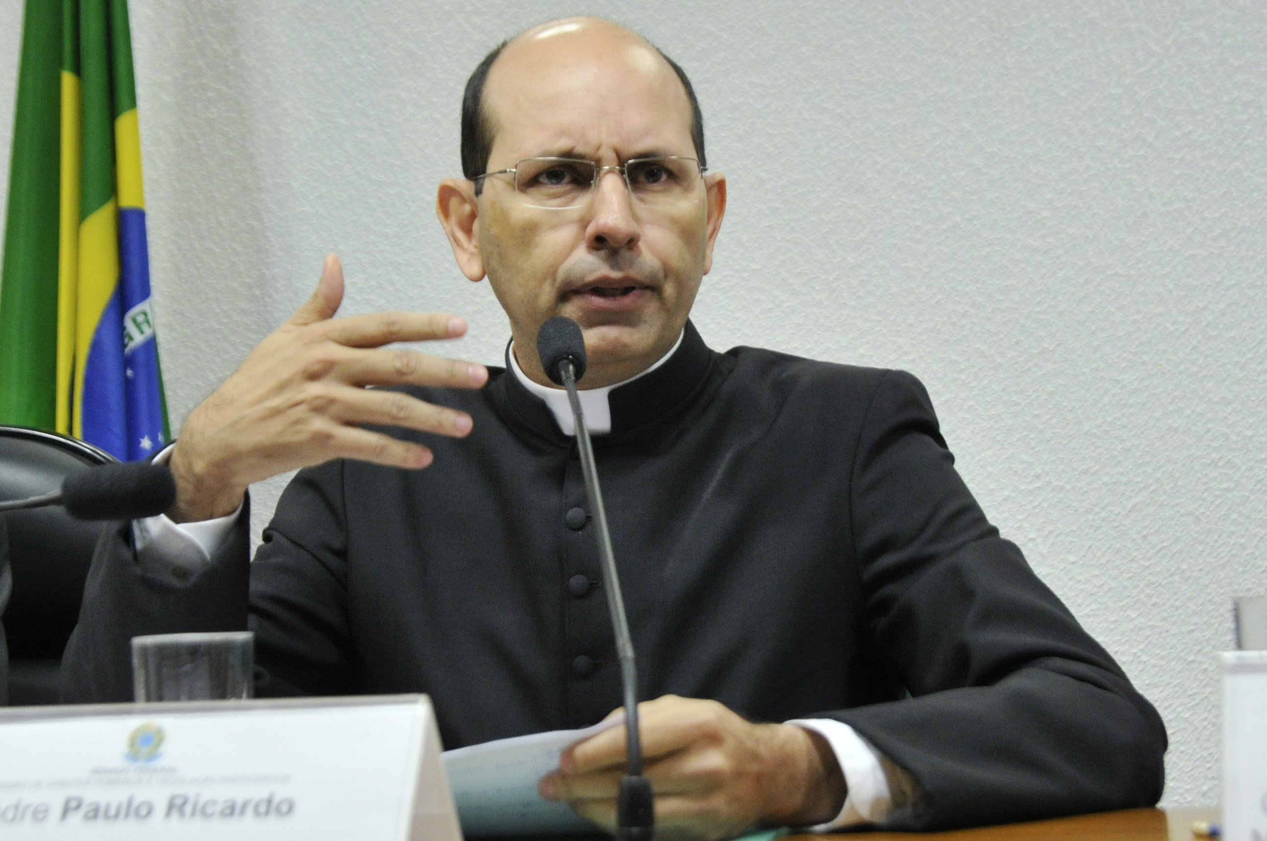 A Comissão de Direitos Humanos e Legislação Participativa (CDH) realiza audiência pública interativa para instruir SUG 15/2014, que regula interrupção voluntária da gravidez, dentro das doze primeiras semanas, pelo Sistema Único de Saúde (SUS). Em pronunciamento, Padre Paulo Ricardo. Foto: Geraldo Magela/Agência Senado.